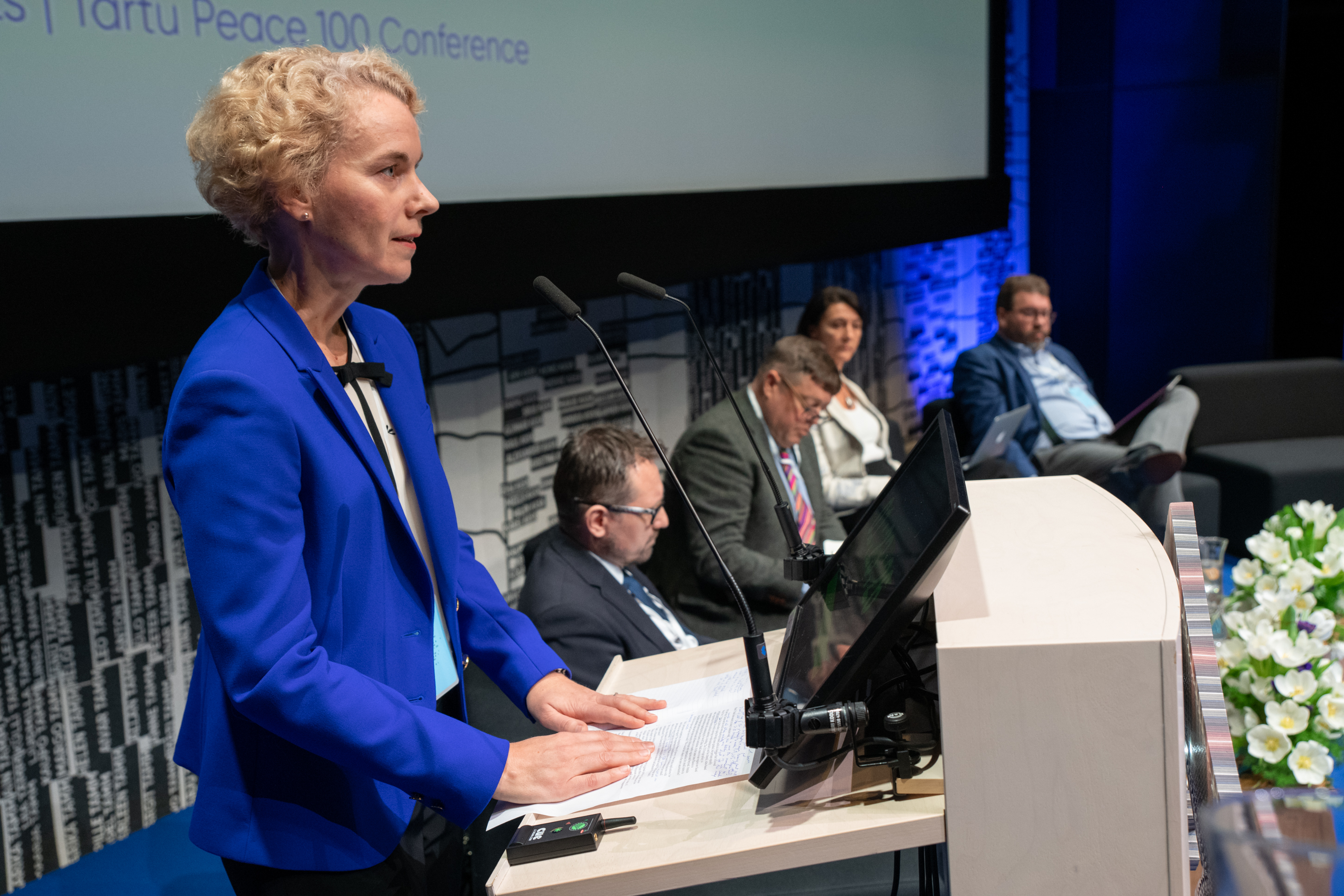 Kristi Raik, Tartu rahule pühendatud rahvusvaheline välispoliitika konverents